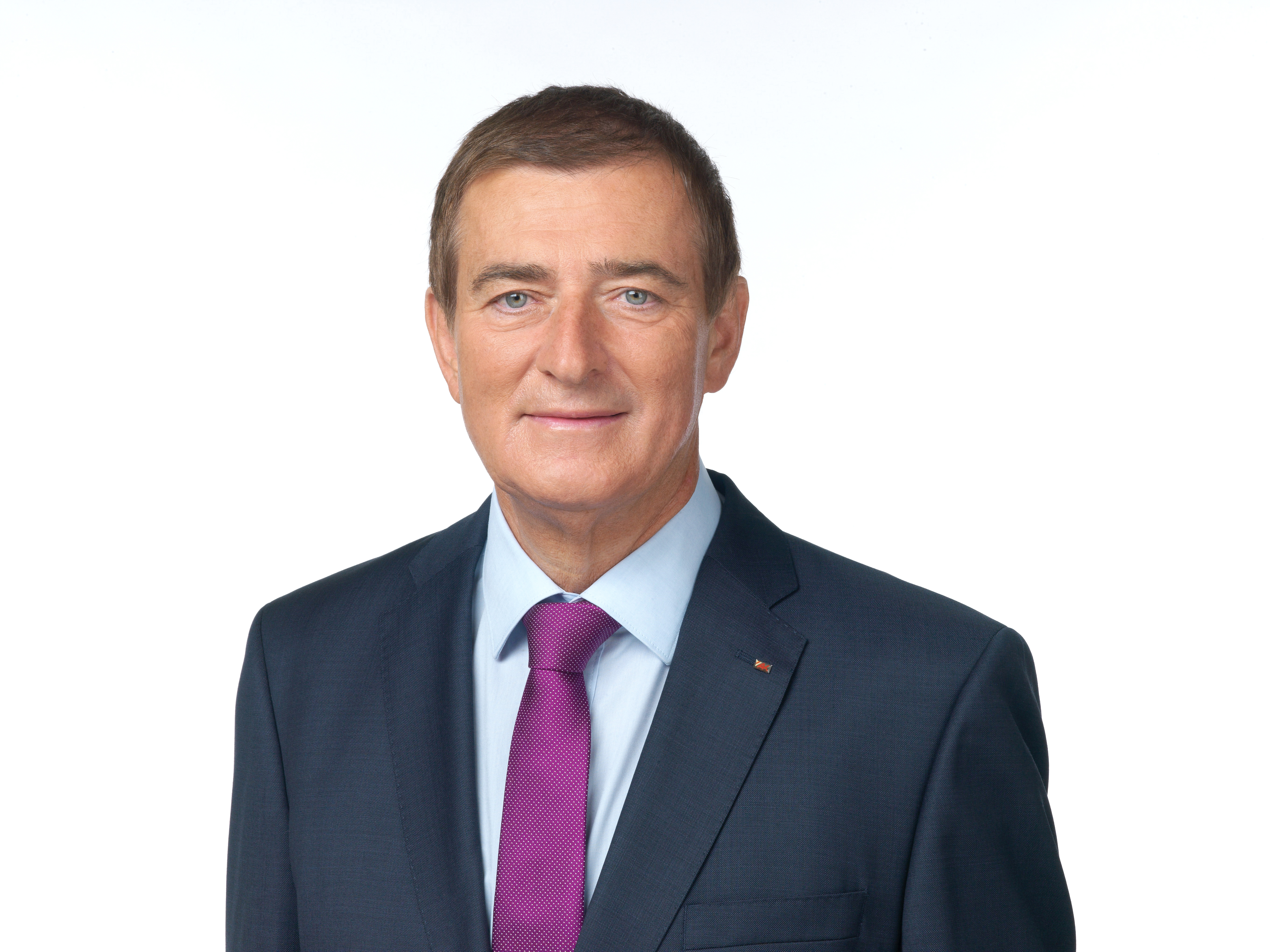 Porträtfoto des AK Kärnten Präsidenten Günther Goach